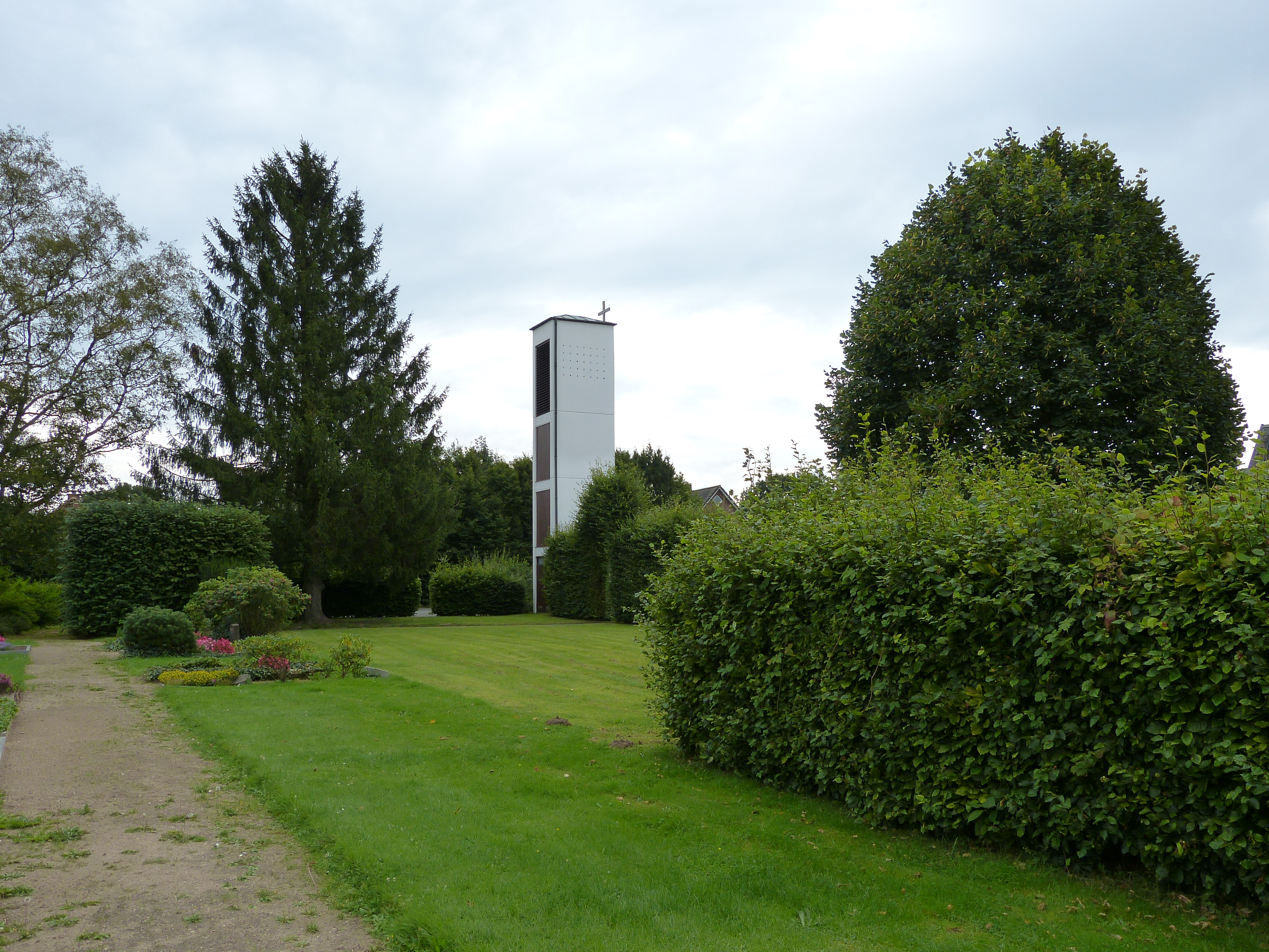 Der Glockenturm der Apostel-Johannes-Kirche in Oering ist ein Kulturdenkmal.